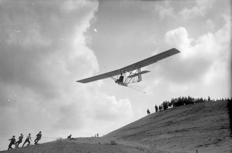 Schüler-Segelflugveranstaltung in Trebbin in der Mark ! Ein wohlgelungener Flug eines Schülers in den Trebbiner Bergen.